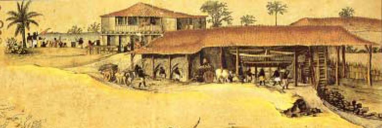 Comptoir hollandais du Pernambouc - Détail de la carte géographique de la préfecture de Pernambuco. créée par Georg Markgraf à partir de 1638, d'après une illustration de Frans Post. Dutch establishment of Pernambuco - Detail of the geographical map of the prefesture of Pernambuco, created by Georg Markgraf from 1638, illustration after Frans Post.